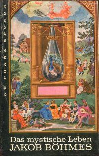 Franz Spunda: Das mystische Leben Jakob Böhmes. Freiburg i. Br. 1961; vordere Umschlagseite.